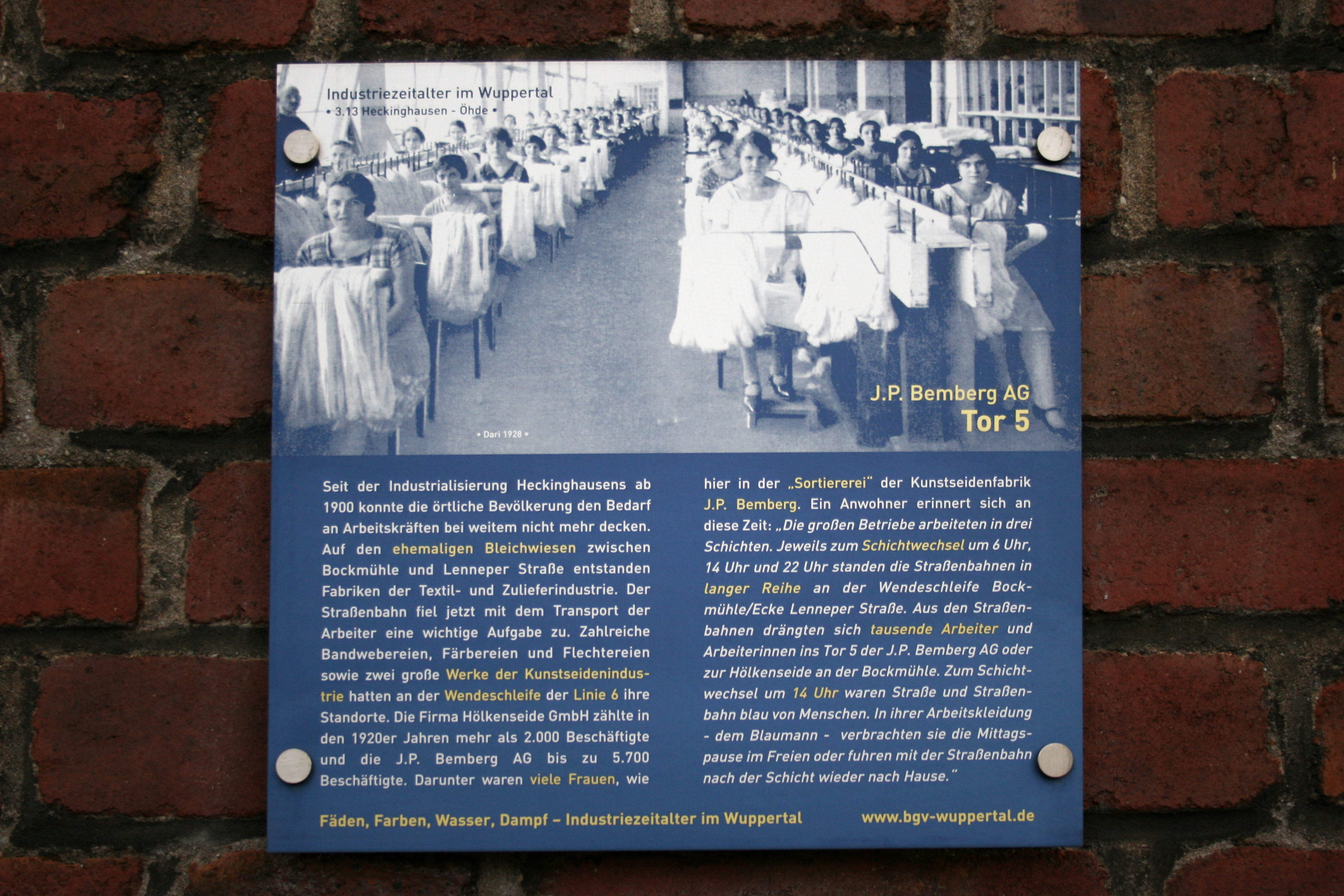 J.P. Bemberg AG in Wuppertal